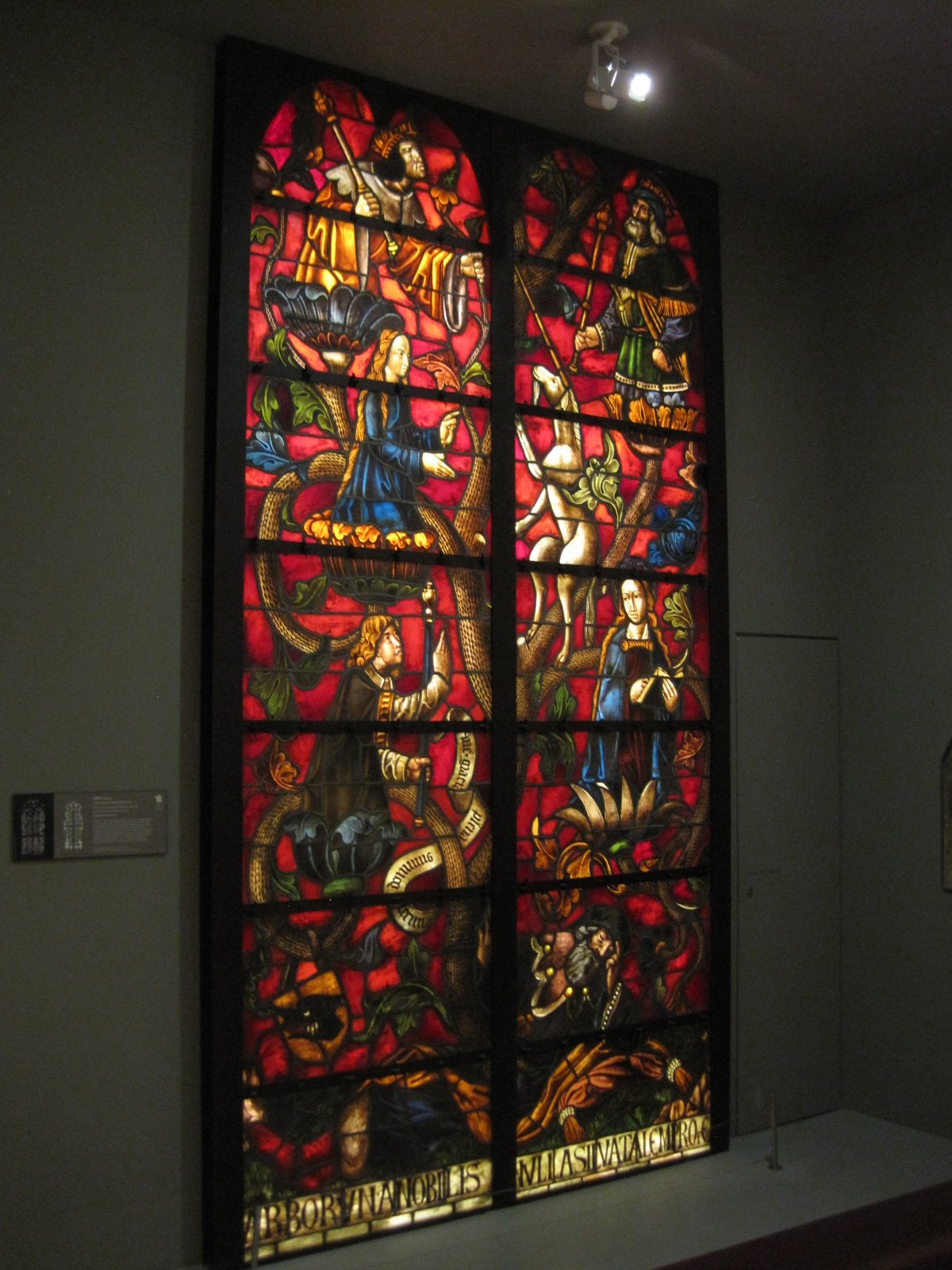 Cité de l'Architecture et du Patrimoine